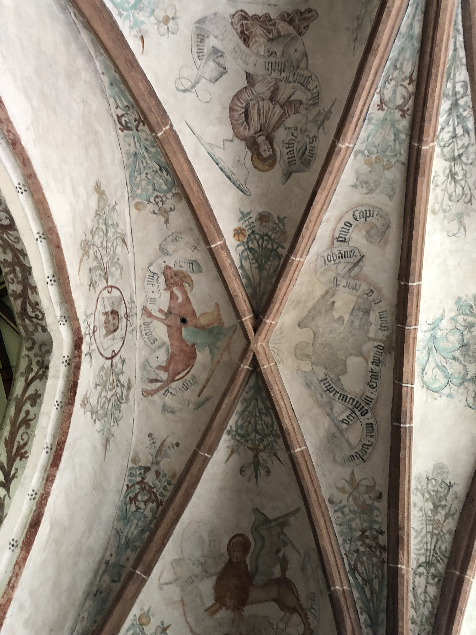 Fresko im Chor der Kapelle zu den 3 Mauren in Mechernich-Hostel